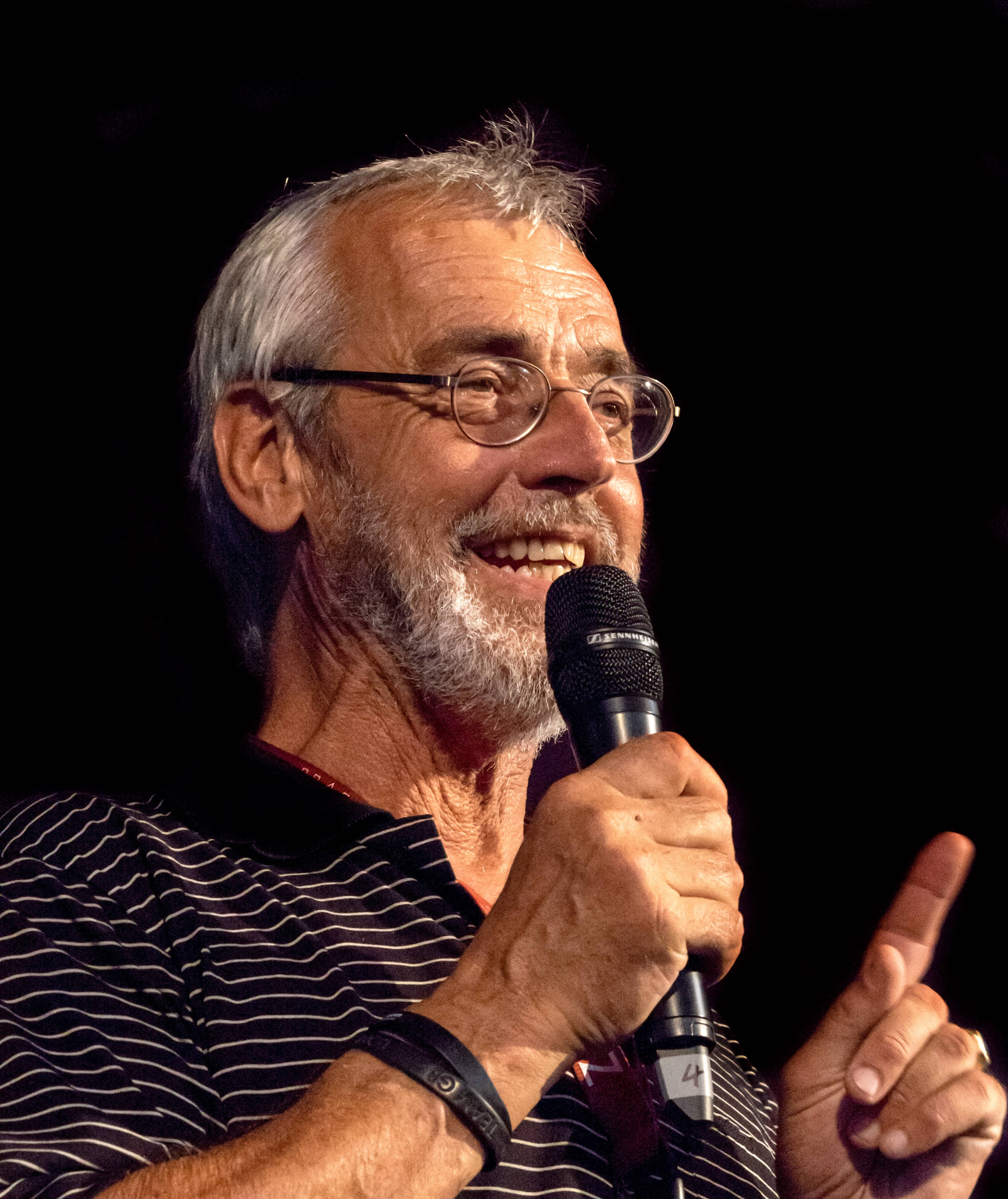 Bilder vom ZMF 2015 Alexander Heisler